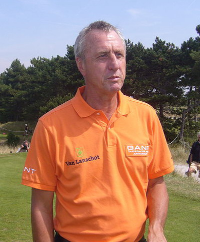 Johann Cruyff, niederländischer Fußballspieler